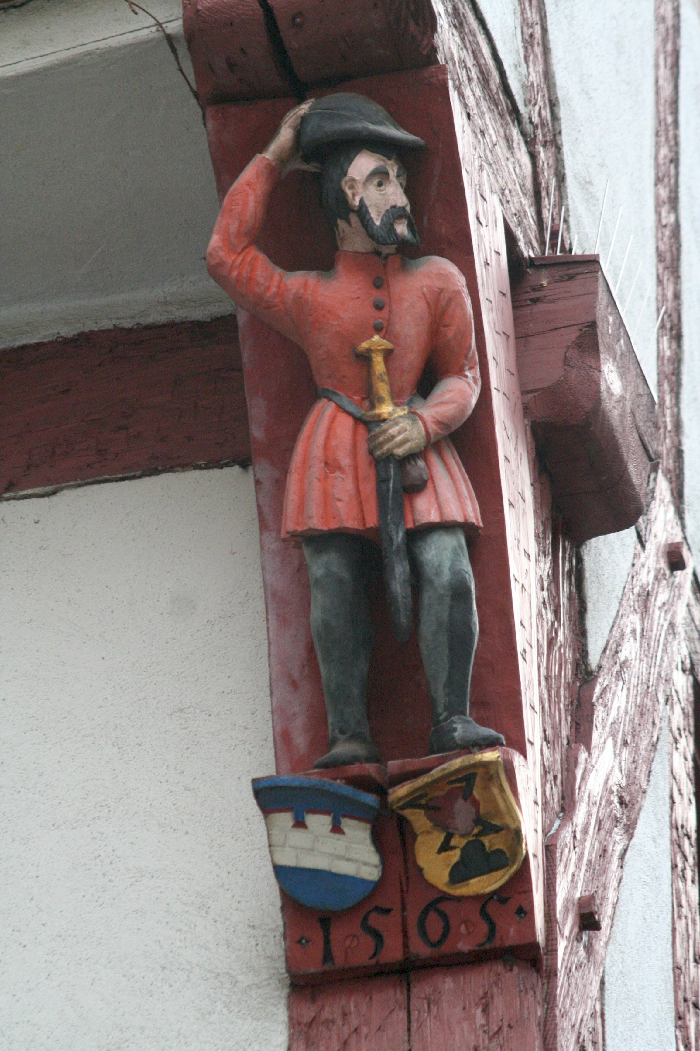 Jos Murer (?) über seinem Wappen und demjenigen seiner Gattin an seinem Haus am Nägelihof in Zürich.